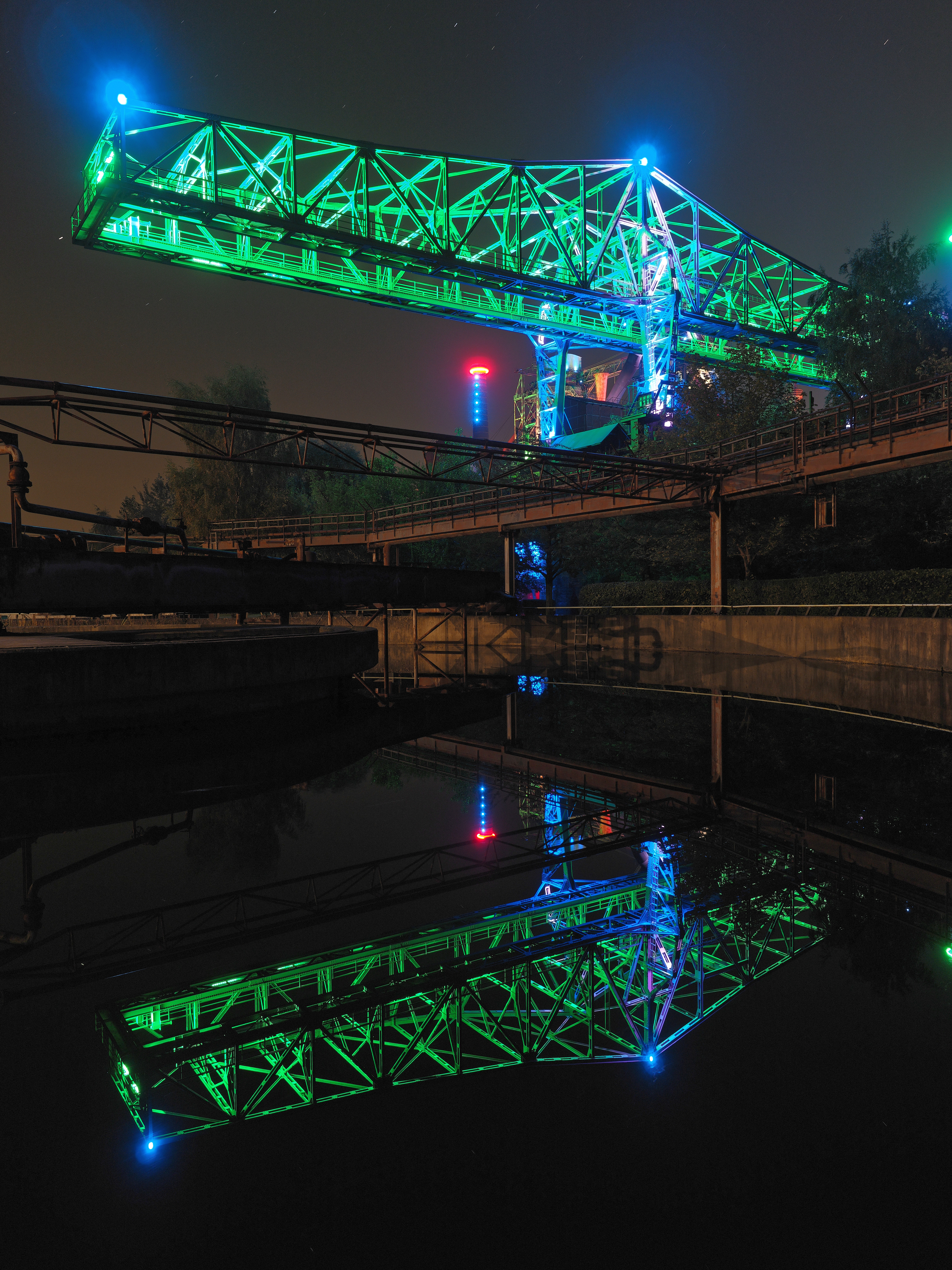 Die Verladebrücke (Das Krokodil) mit Spiegelung im südlichen Klärbecken im Landschaftspark Duisburg, gesehen vom Klärbeckenrand This image shows a heritage building in Germany, located in the North Rhine-Westphalian city Duisburg-Meiderich/Beeck (no. 506).